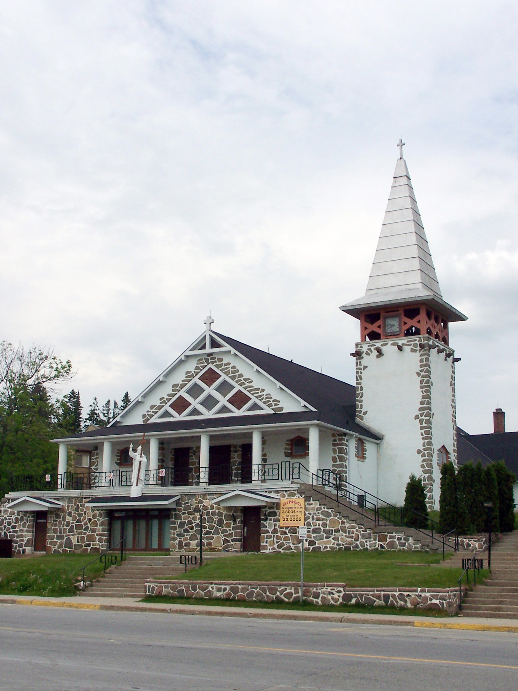 Église de la paroisse du Christ-Roi, à Maniwaki